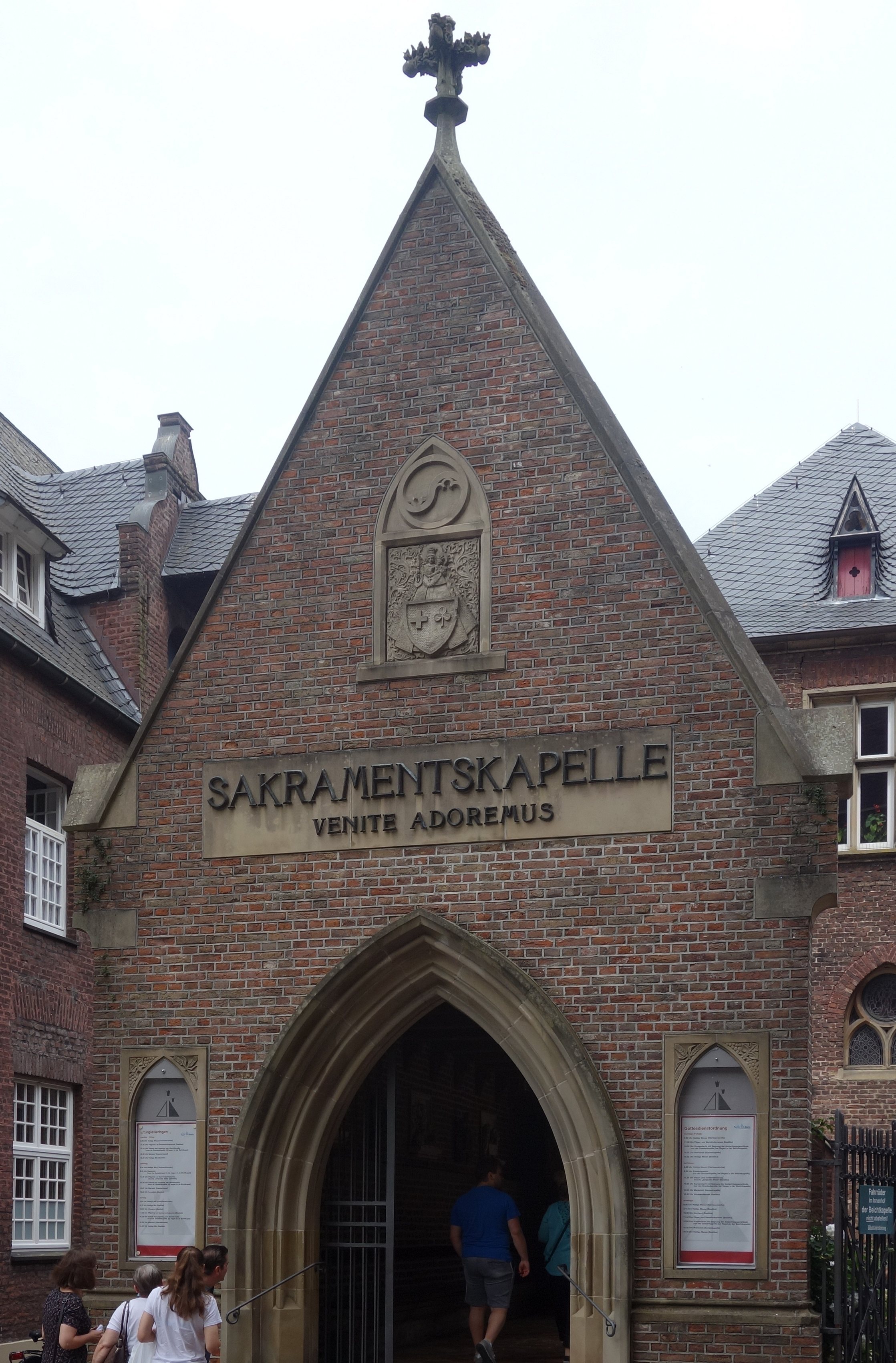 Sakramentskapelle in Kevelaer